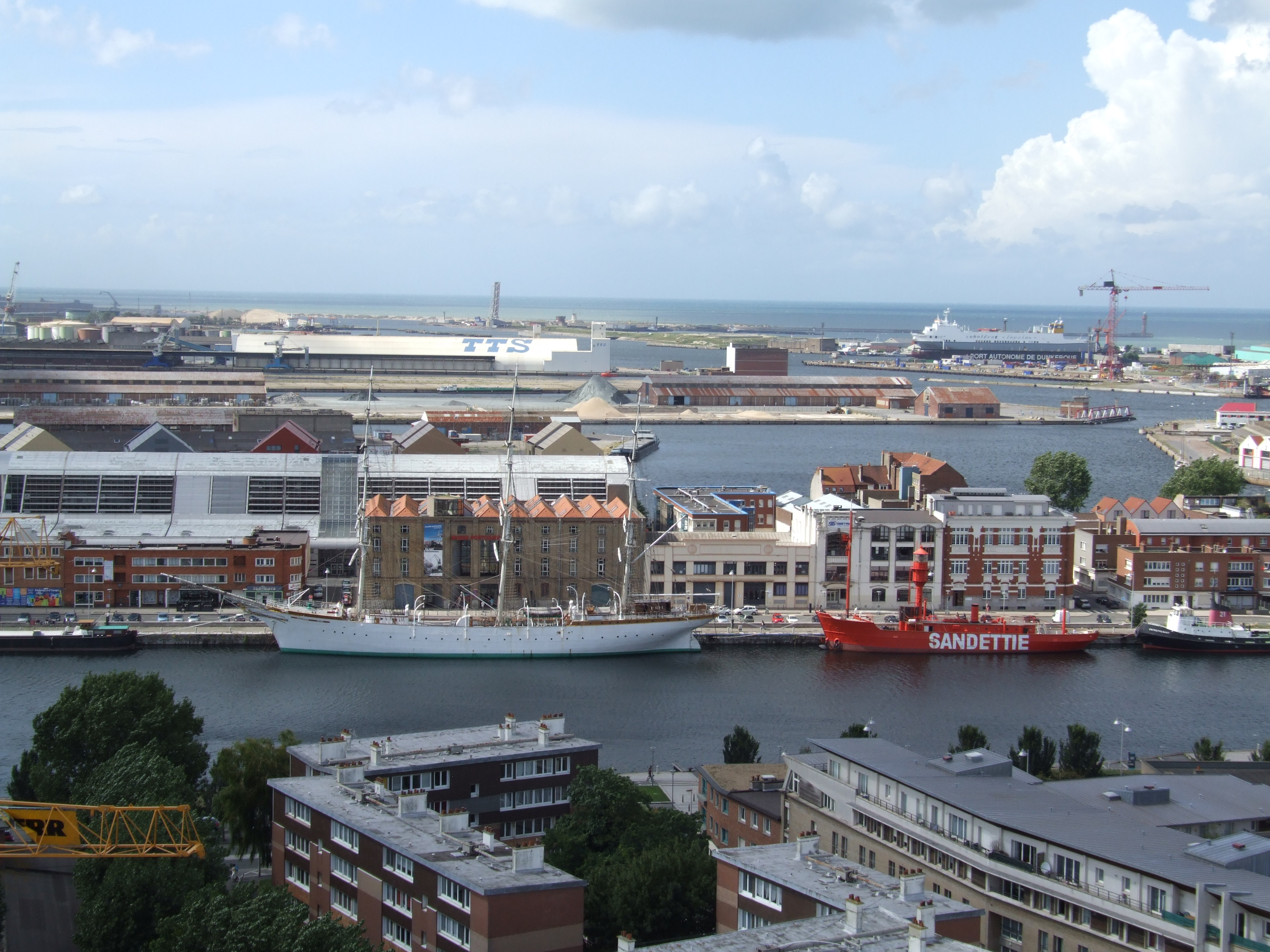 Panoramblick vom Beffroi de Dunkerque - Blick auf das Hafenmuseum mit den Museumsschiffen Duchesse Anne und Sandettié